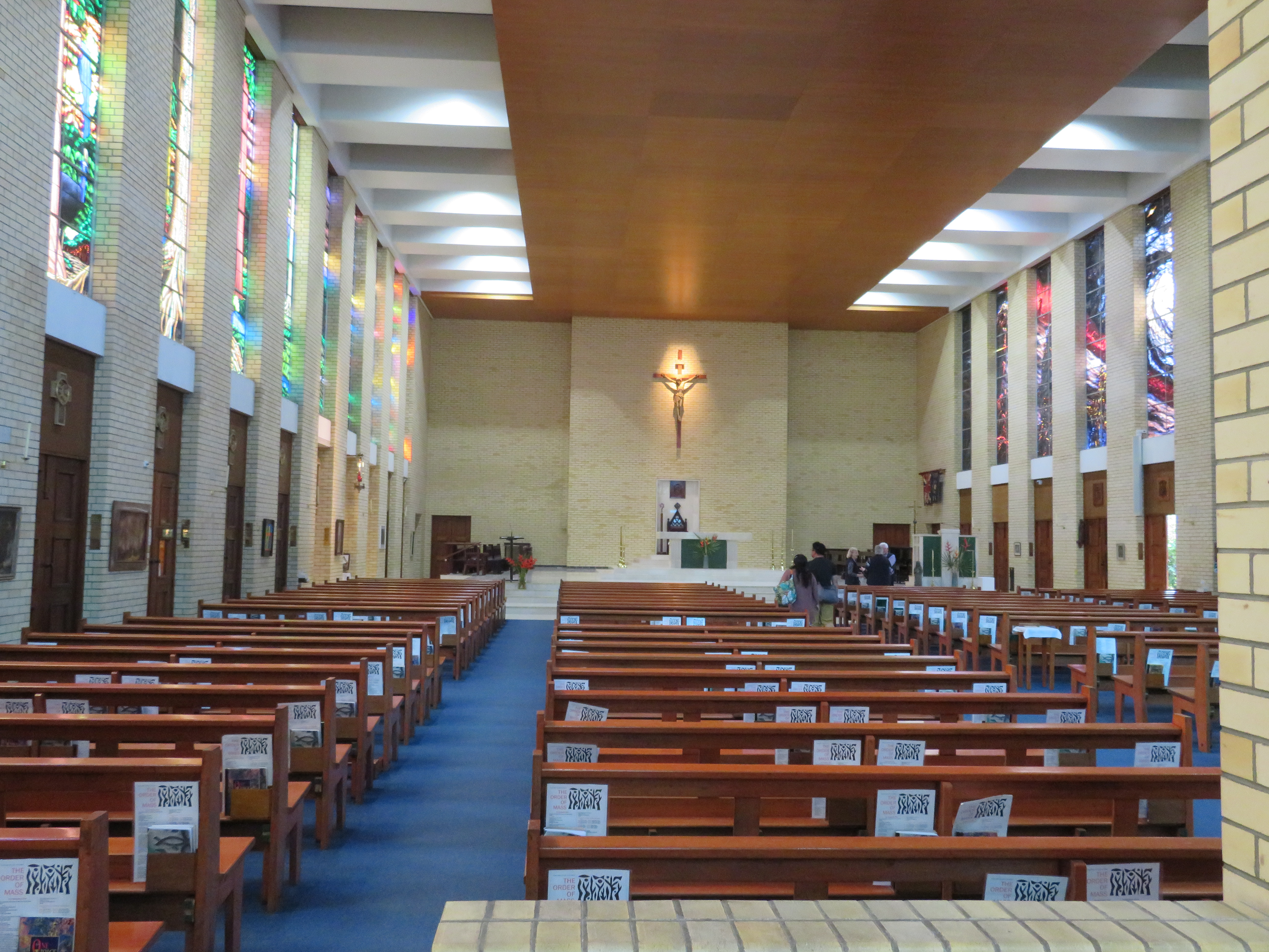 Kath. Dom, Cairns, Queensland, Australien